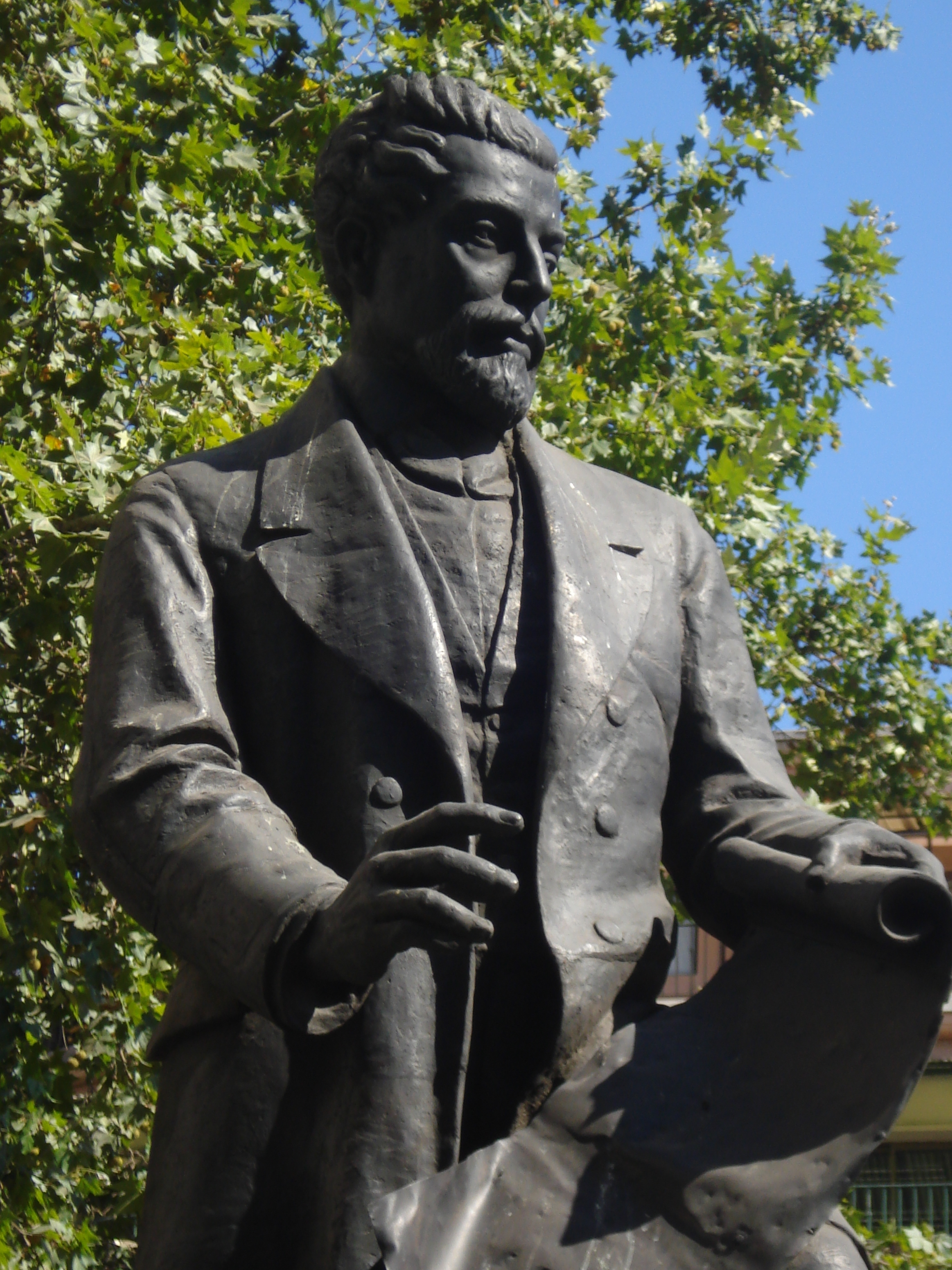 Fermín Vivaceta, estatua en bronce de José Carocca, inaugurada en 1962. Está en la intersección de la Alameda con Diagonal Paraguay, en Santiago de Chile.